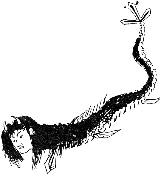 Jinjahime (神社姫) from "Wagakoromo" (我衣, Japanese book)